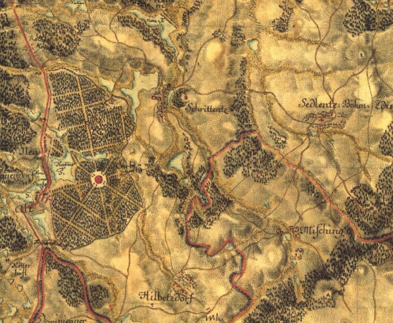 Střítež (okres Jihlava) a jeho okolí - I. vojenské mapování – josefské (1764–1768, 1780–1783).